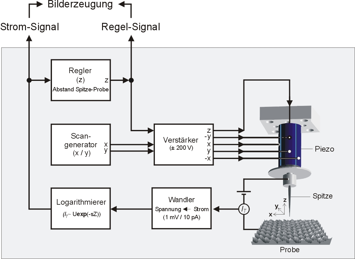 Schema der Funktionsweise eines Rastertunnelmikroskops. Erstellt mit CorelDraw unter Verwendung einer selbst erstellten realen STM-Aufnahme von Graphit.